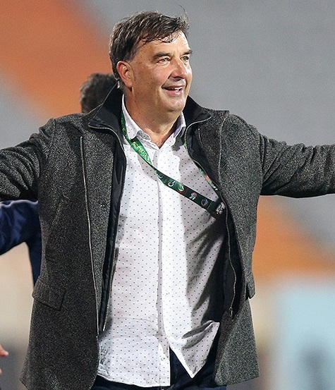 تیم فوتبال استقلال در دیدار هفته پانزدهم رقابت‌های لیگ برتر از ساعت ۱۷:۳۰ شنبه، ۲۳ آذر ۱۳۹۸ در ورزشگاه آزادی میزبان شاهین شهرداری بوشهر بود و با نتیجه ۴ بر یک به برتری رسید. گل‌های استقلال را در این بازی آرش رضاوند (۲۹)، مهدی قائدی (۵۲)، محمد دانشگر (۵۸) و شیخ دیاباته (۶۹) به ثمر رساندند و روزبه چشمی (۸۸ - گل به خودی) برای شاهین گلزنی کرد. (مشاهده گزارش بازی)